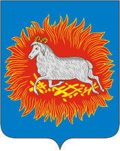 Герб Каргопольского района Архангельской области